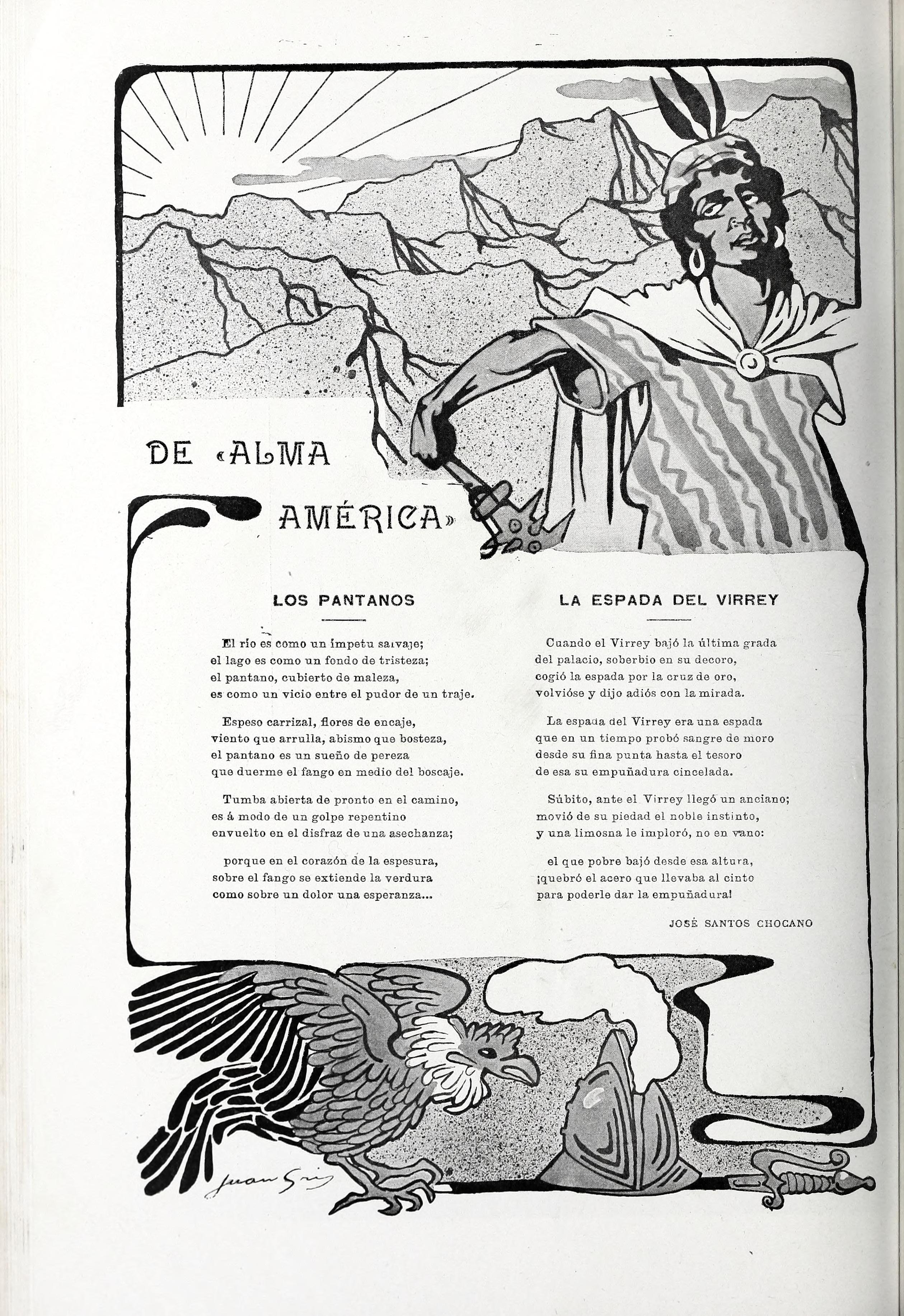 De «Alma América».